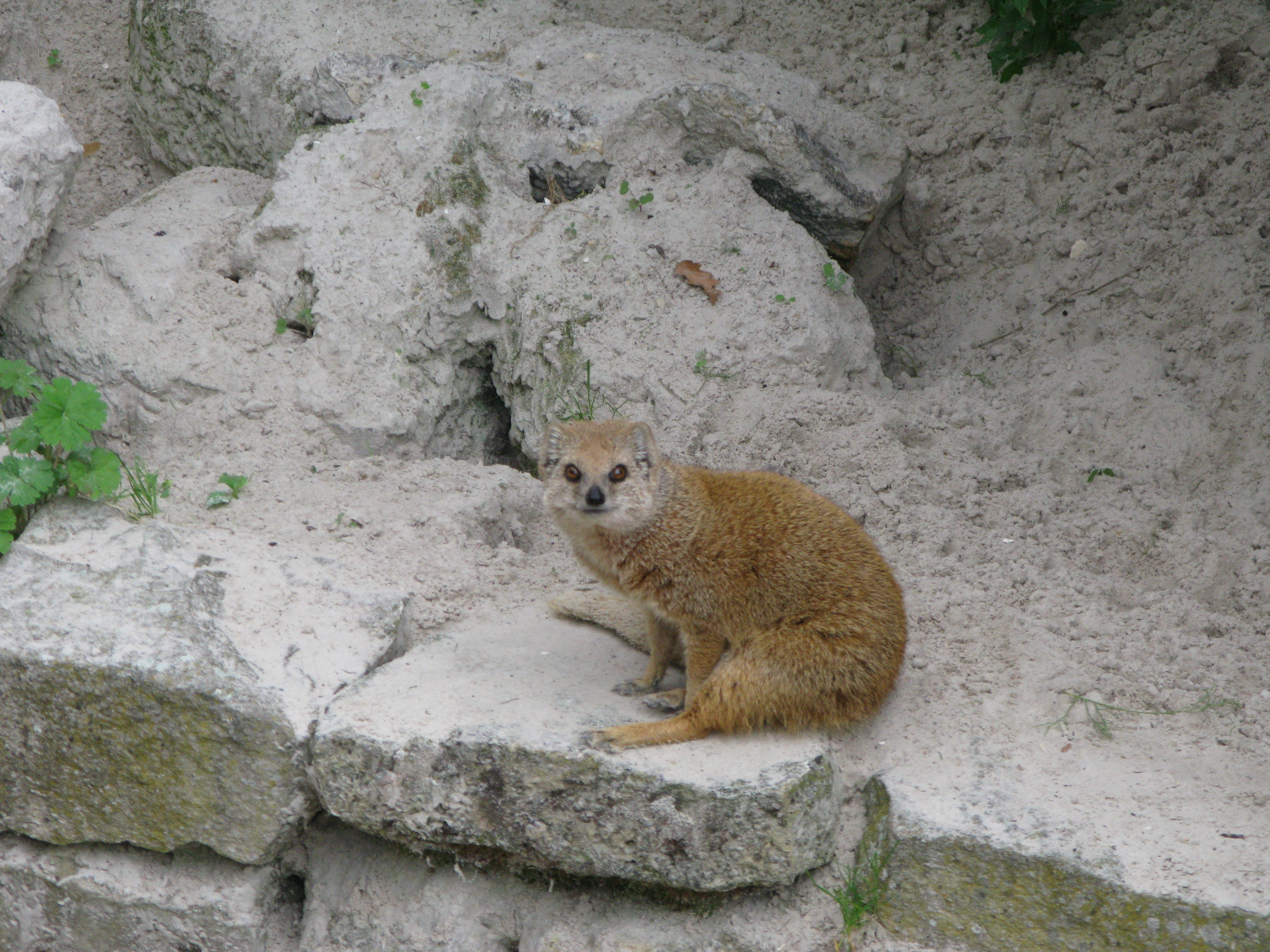 Mangouste jaune (cynictis penicillata), ménagerie du Jardin des plantes de Paris.